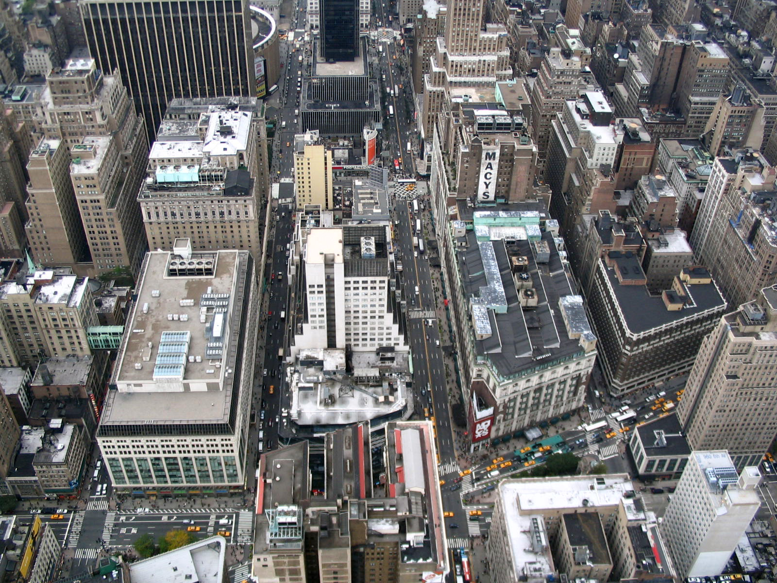 Вид на Бродвей с крыши Эмпайр-Стейт Билдинга